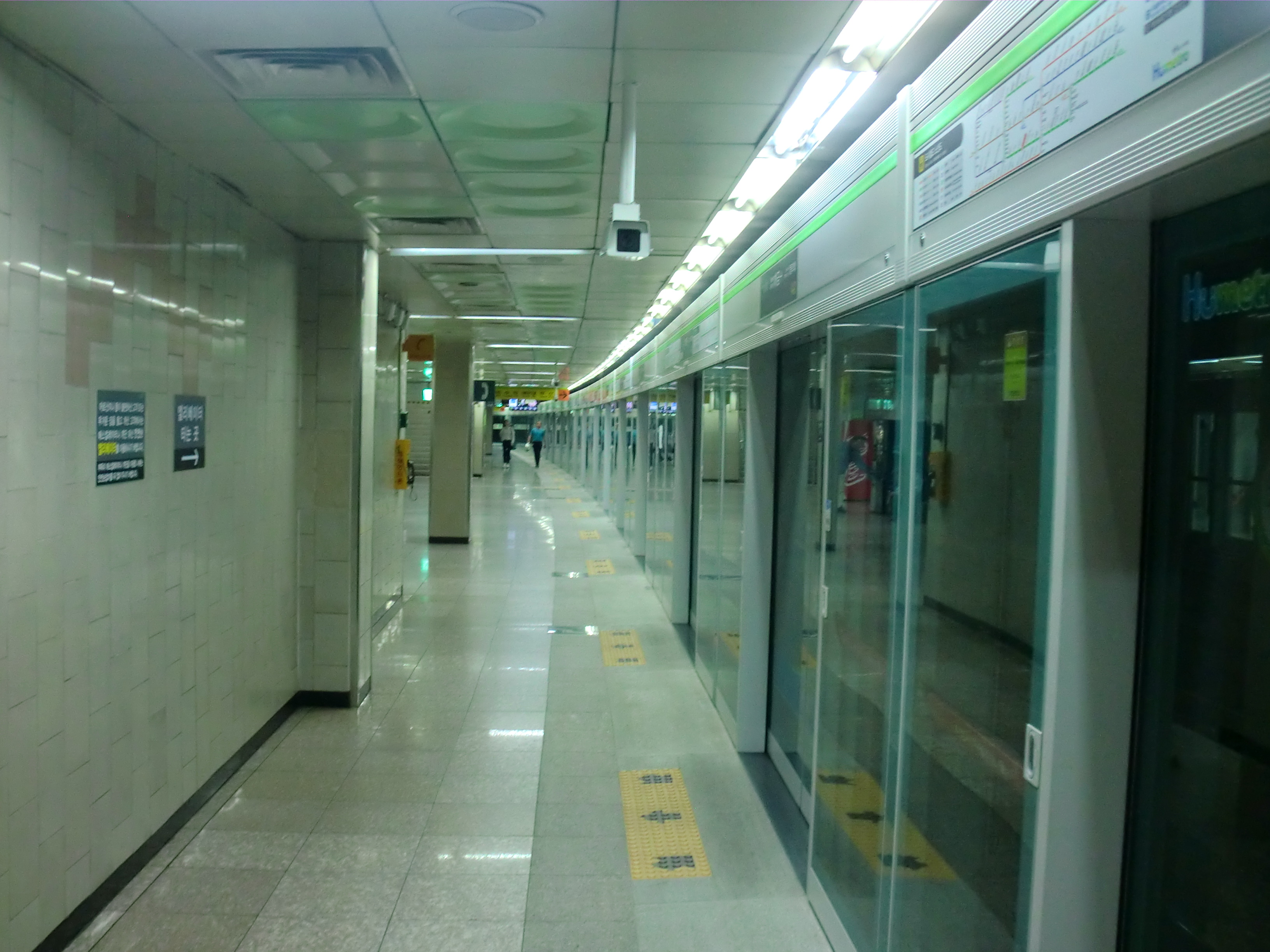 부산도시철도 2호선 개금역